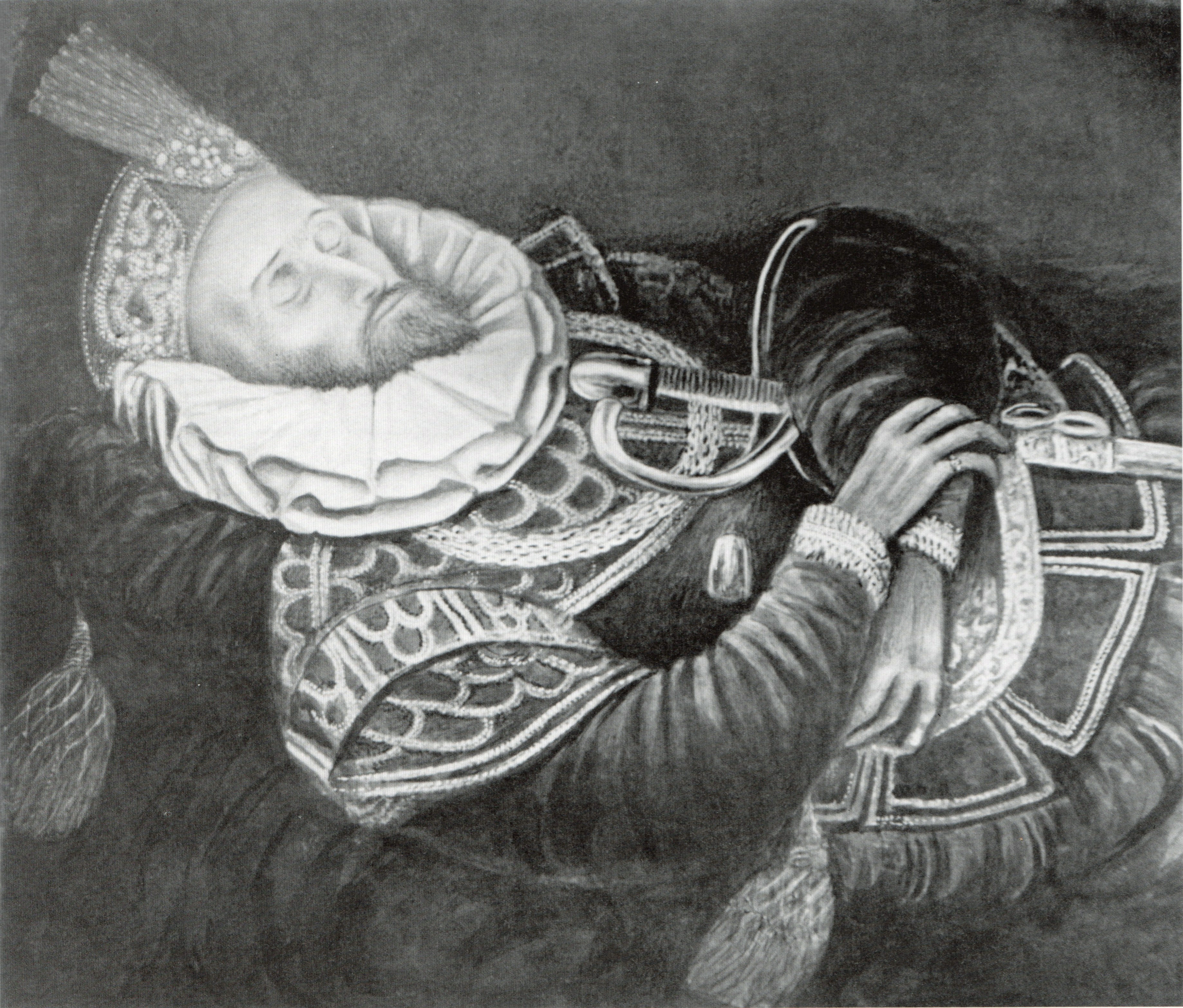 Totenbildnis von Kasimir VI. von Pommern, früher in der Schloßkirche Stettin, Verbleib seit 1945 unbekannt.